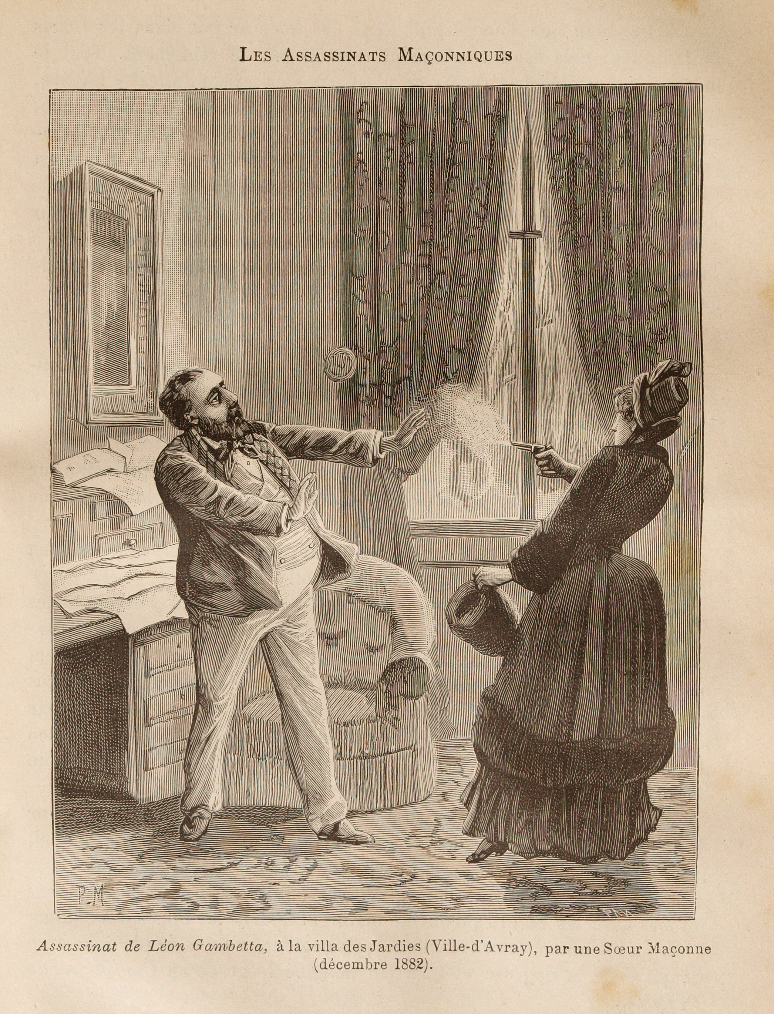 Une des gravures du document de Léo Taxil, Les Mystères de la Franc-Maçonnerie, Paris, 1886.